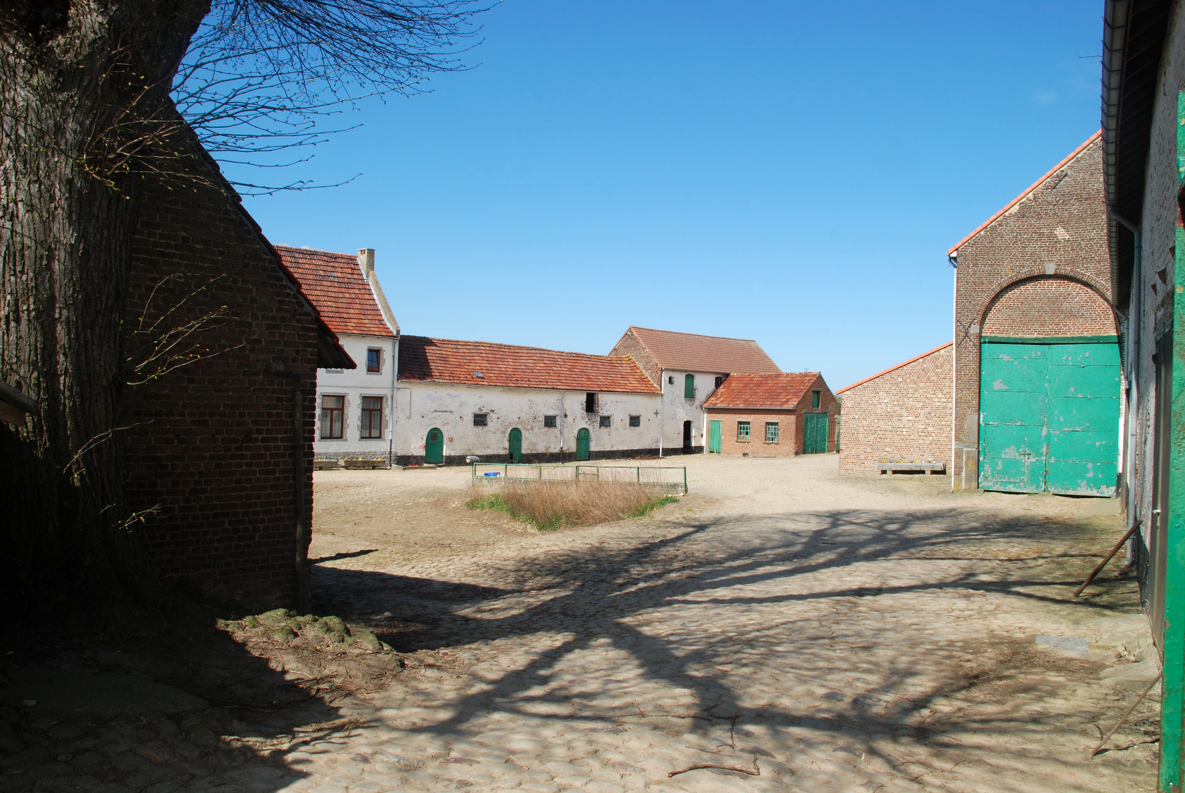 Belgique - Brabant wallon - Genappe - Ferme du Chantelet